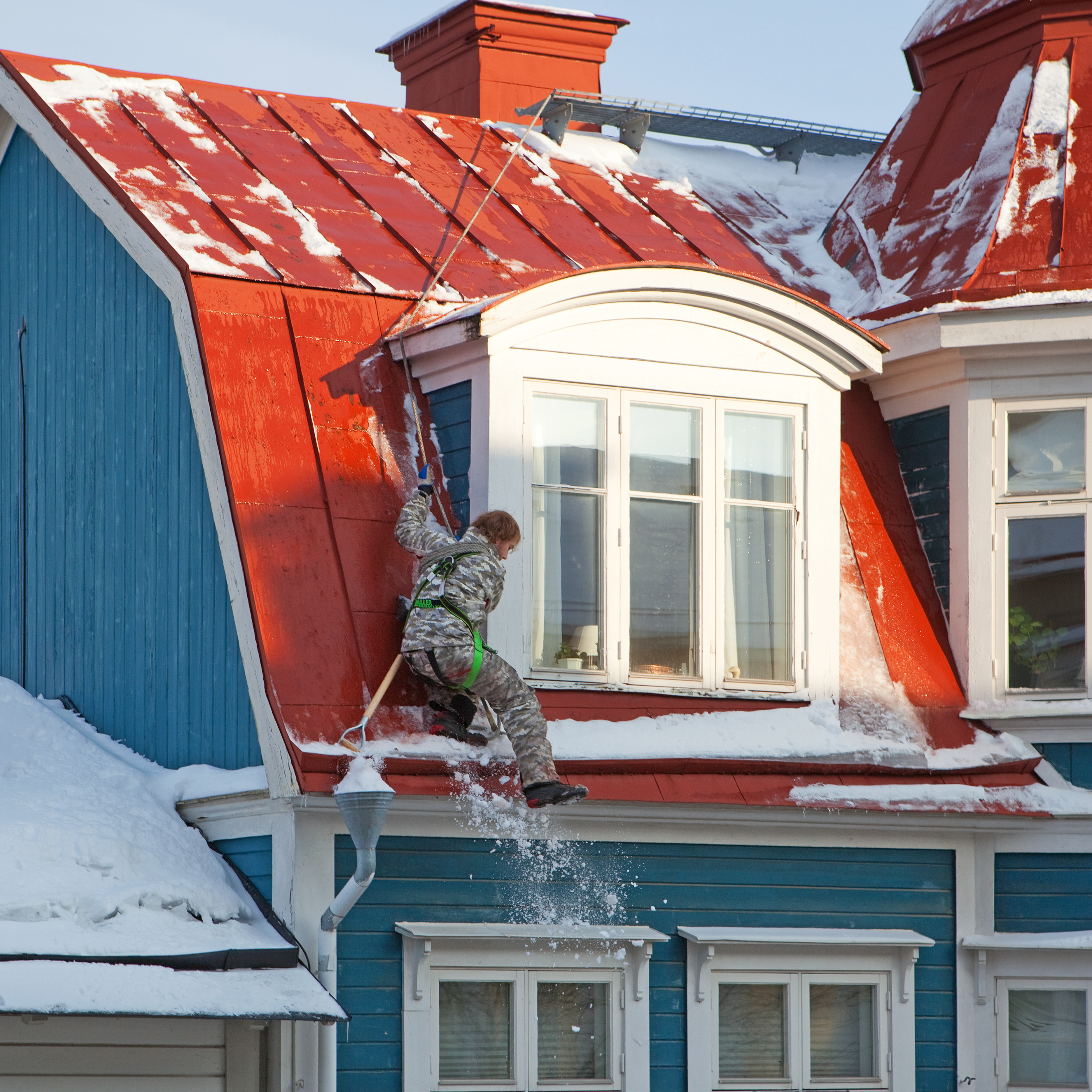 Säkerhetslina räddar snöröjare.